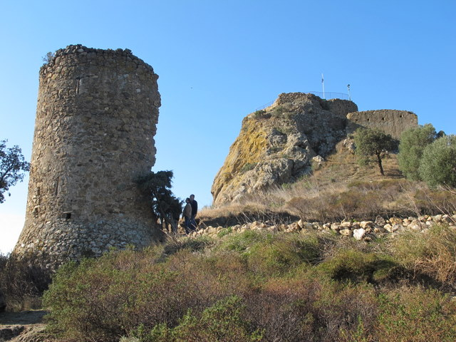 Castell de Quermançó a Vilajuïga - Alt Empordà /Catalunya